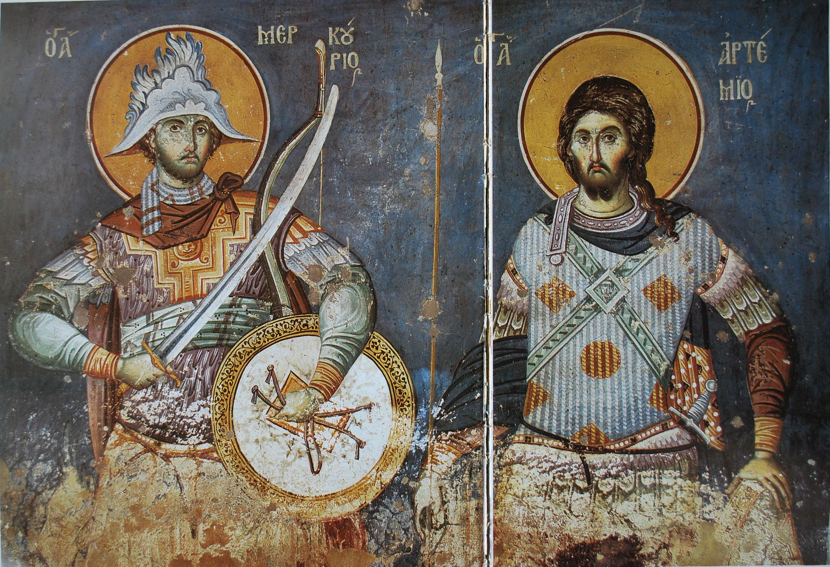 Св. Меркурий и св. Артемий. Фреска в Прорате